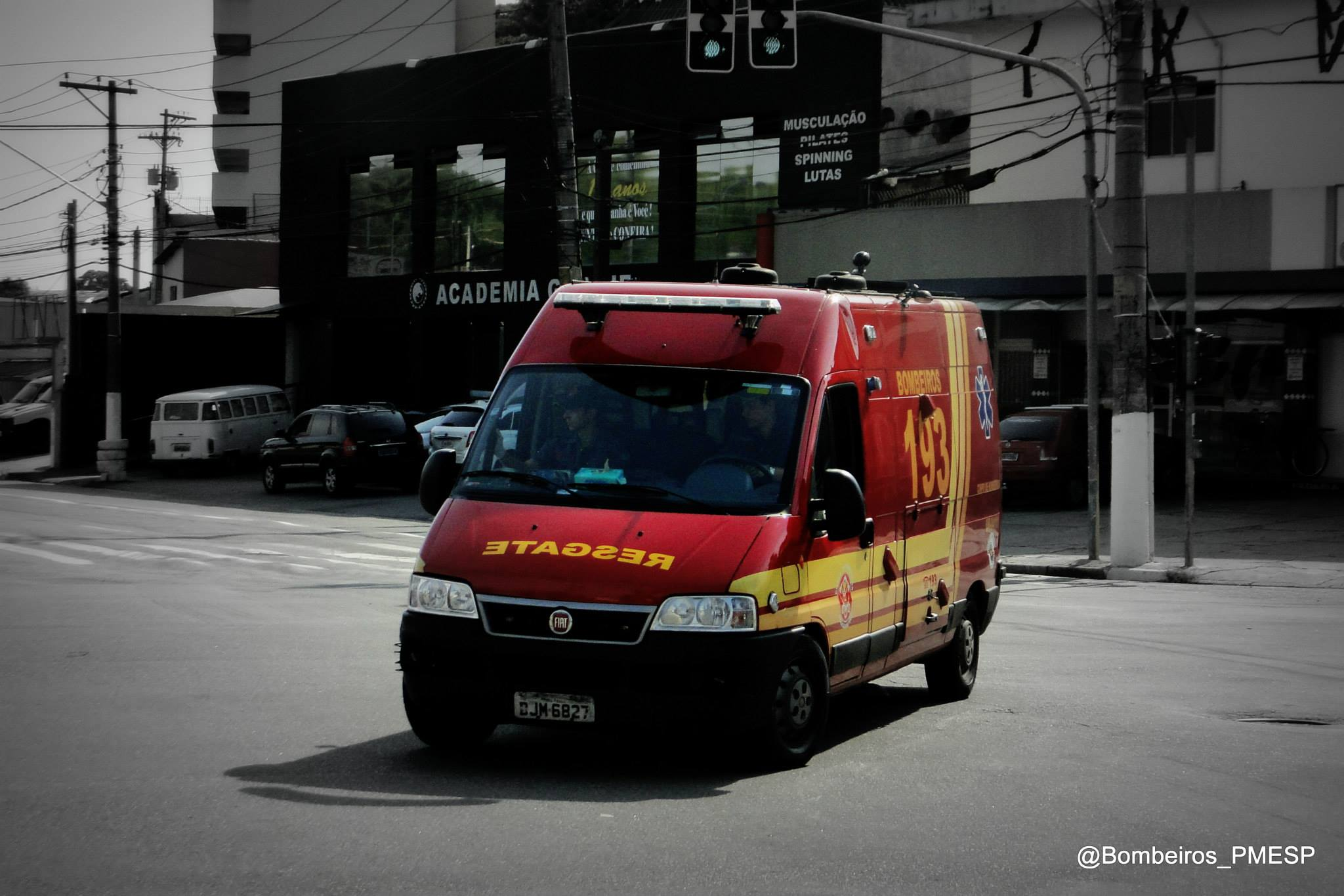 Unidade de Resgate do PB Butantã